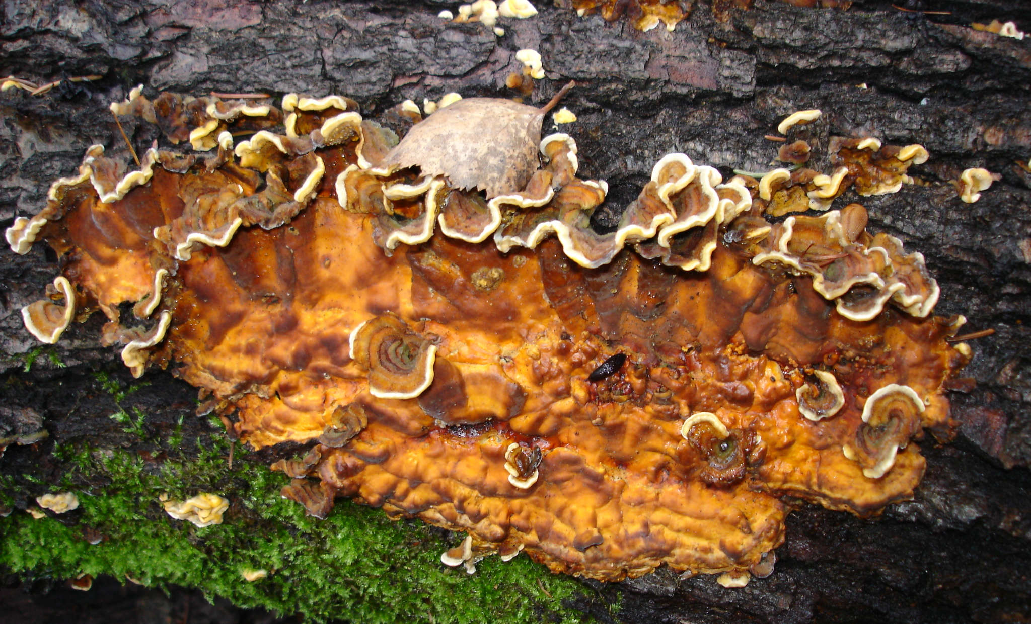 Striegeliger oder Zottiger Schichtpilz (Stereum hirsutum)